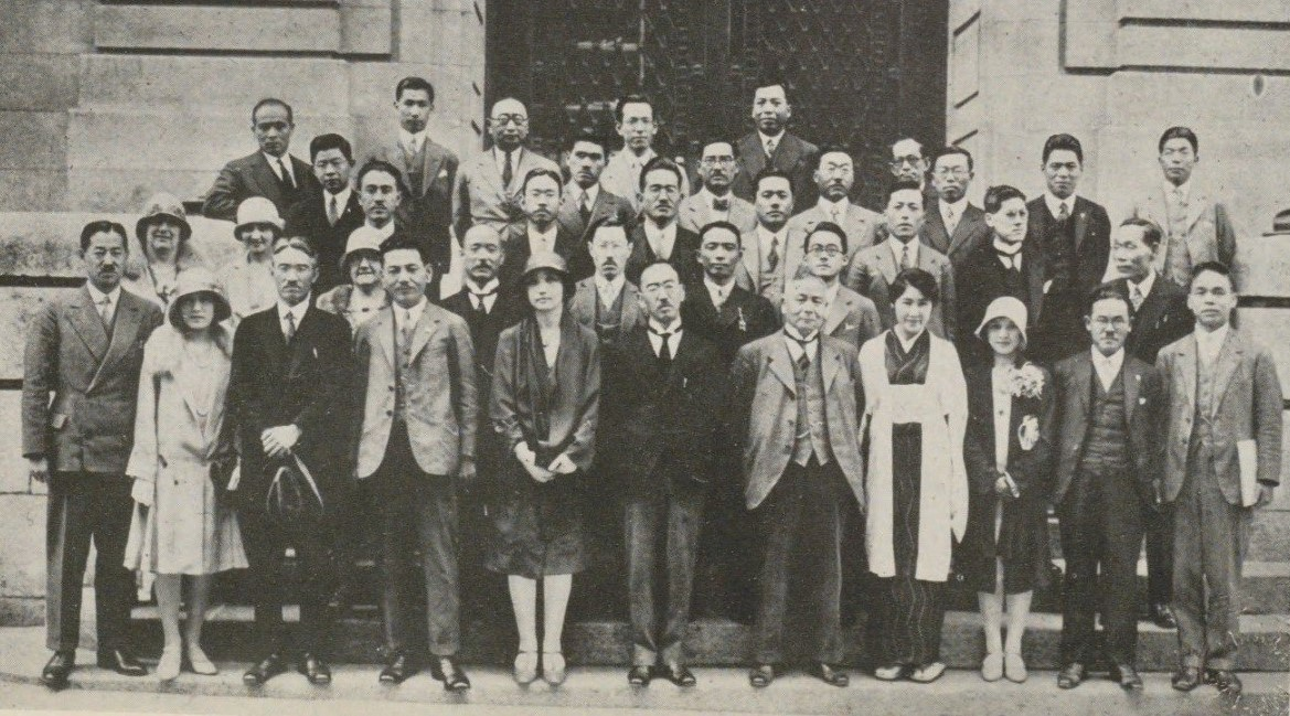 1929年国際労働会議参加者 宮島綱男夫妻、小島緑、政府代表湯沢三千男、労働代表松岡駒吉、吉阪俊蔵茂木惣兵衛 (3代目)、岩崎清一郎